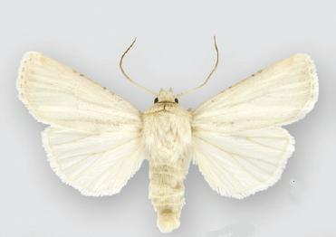 Euxoa lafontainei male